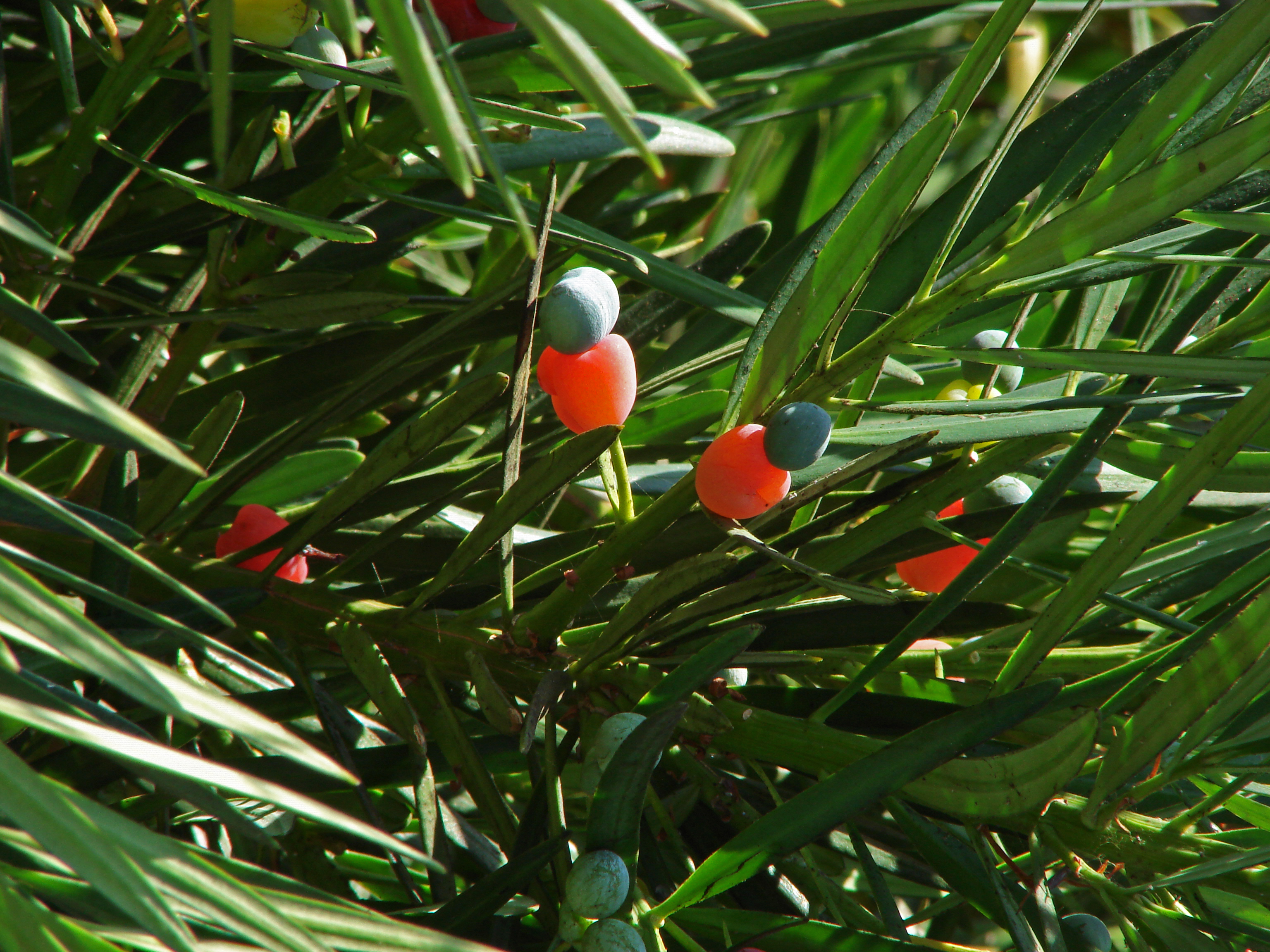 Zweig mit Früchten